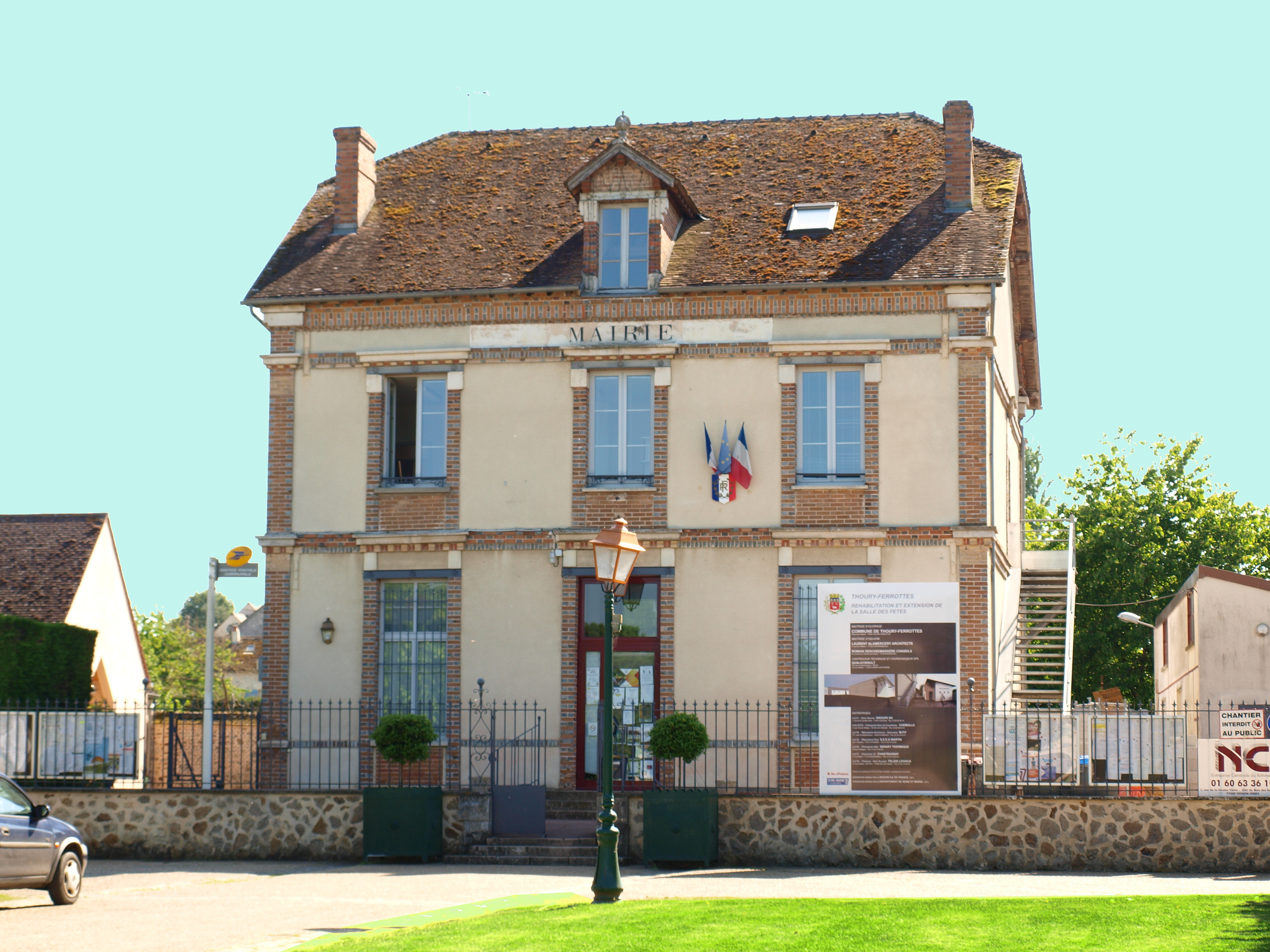 Mairie de Thoury-Ferrottes (Seine-et-Marne, France)